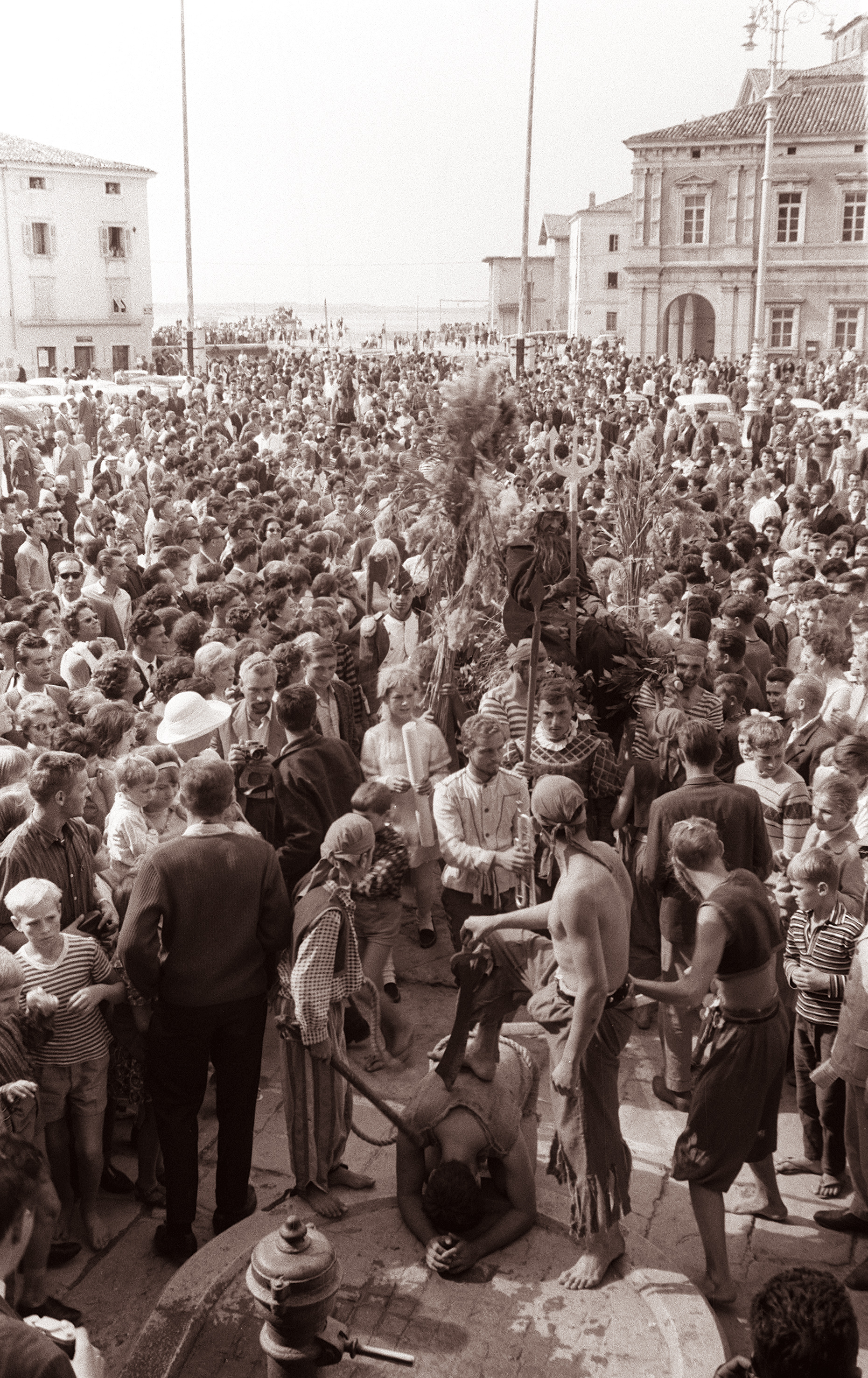 Tradicionalni krst pomorščakov v Piranu